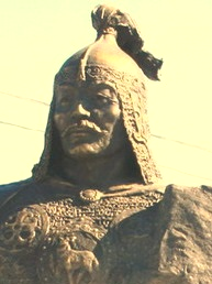 Қазақша (кирил): Қазақ халқынын батыры Мамай Жұмағұлұлы